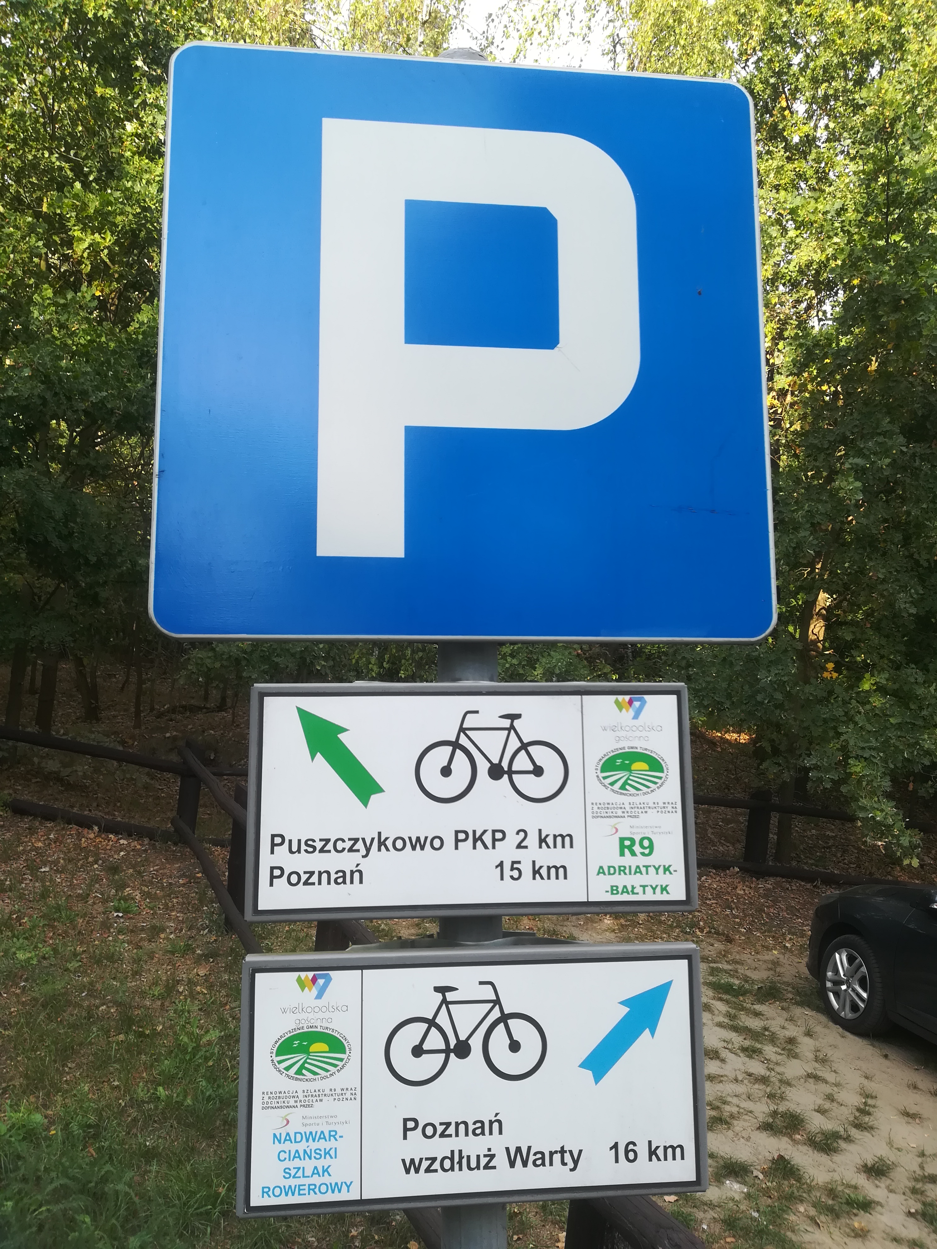 Szlaki rowerowe w Puszczykówku.